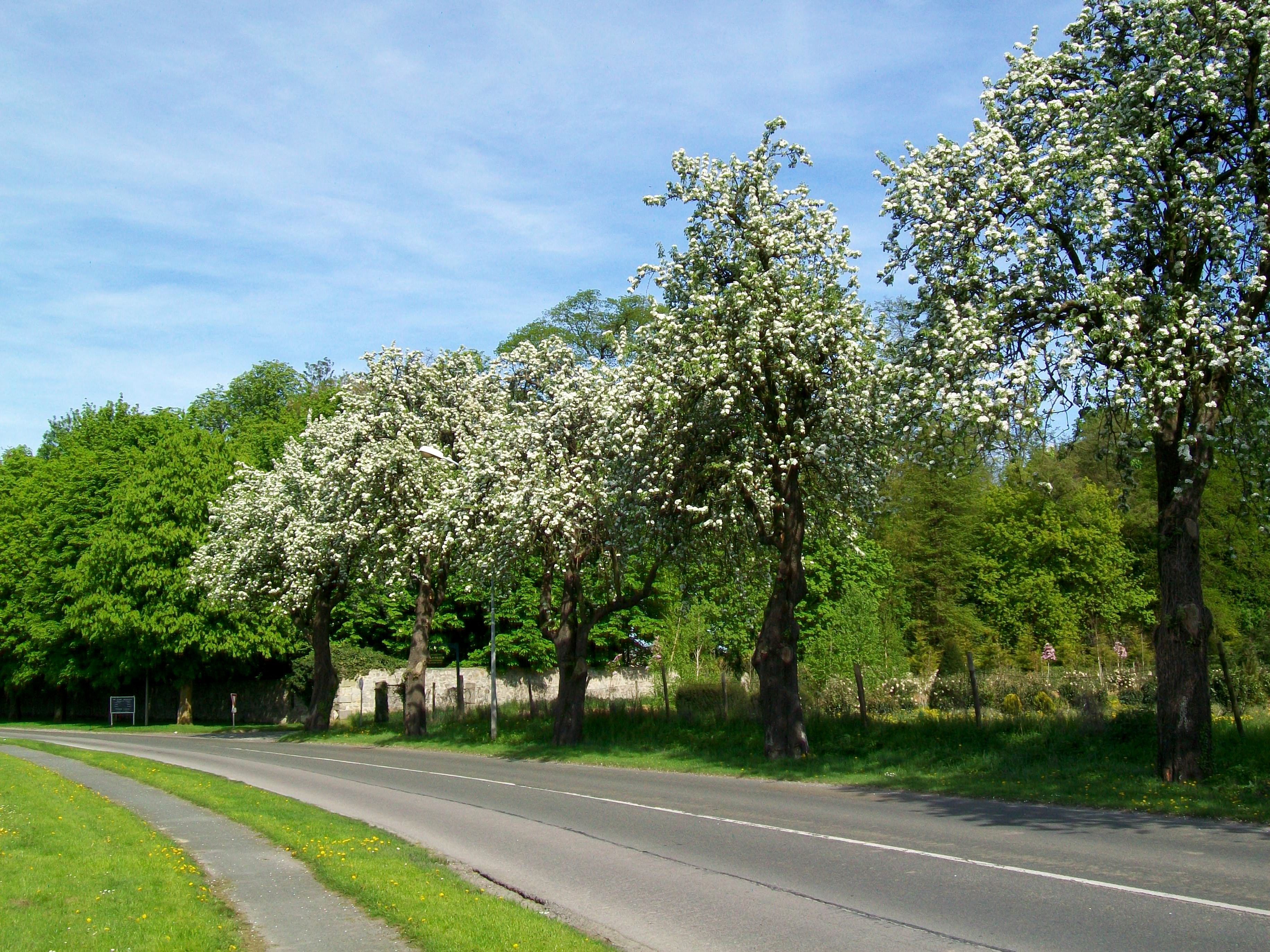 L'entrée du village en venant de Plailly sur la D 922. Les arbres fruitiers sont, tout comme les pépinières, caractéristiques du paysage de Mortefontaine.